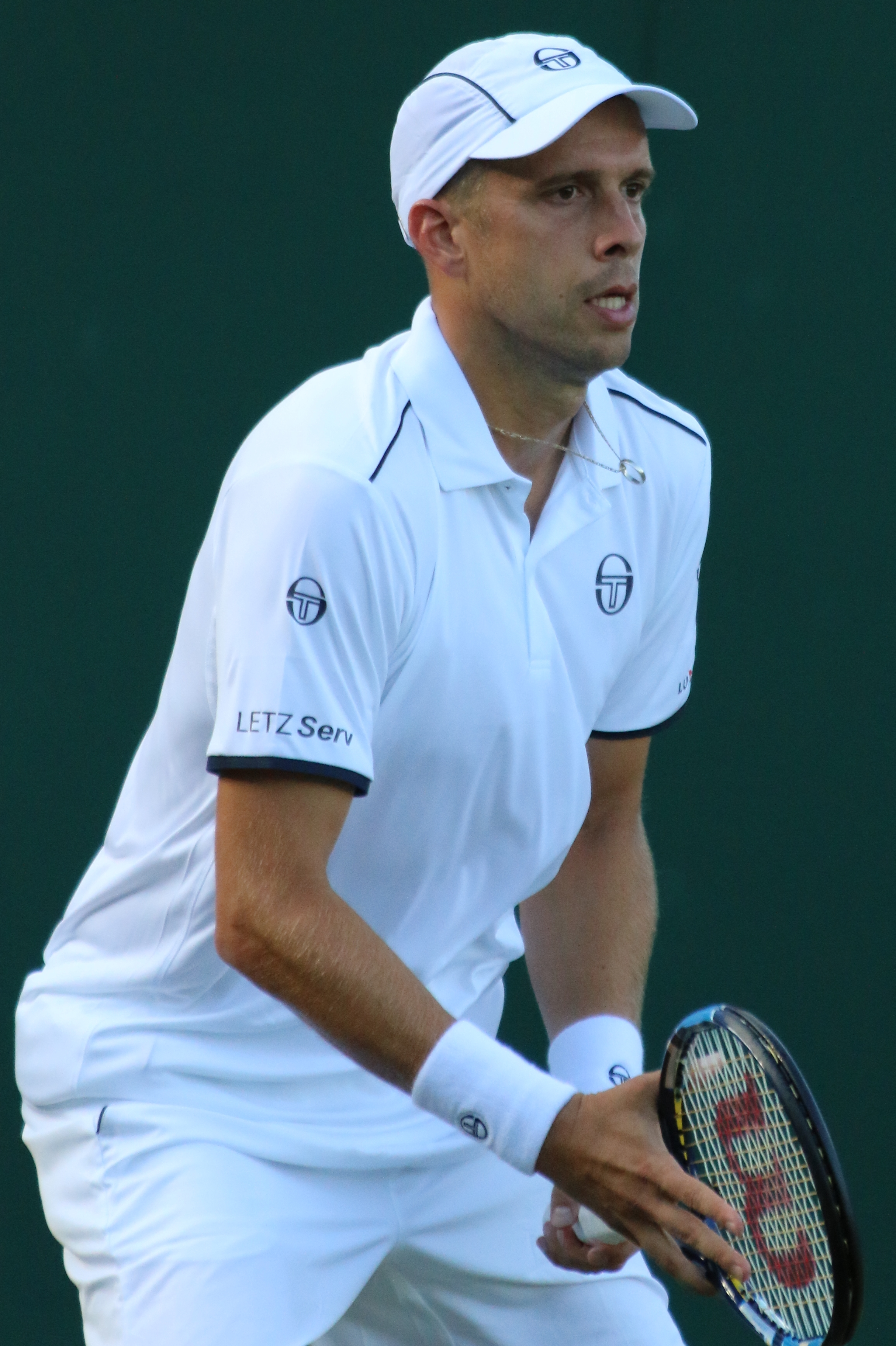 Muller WM17 (8)